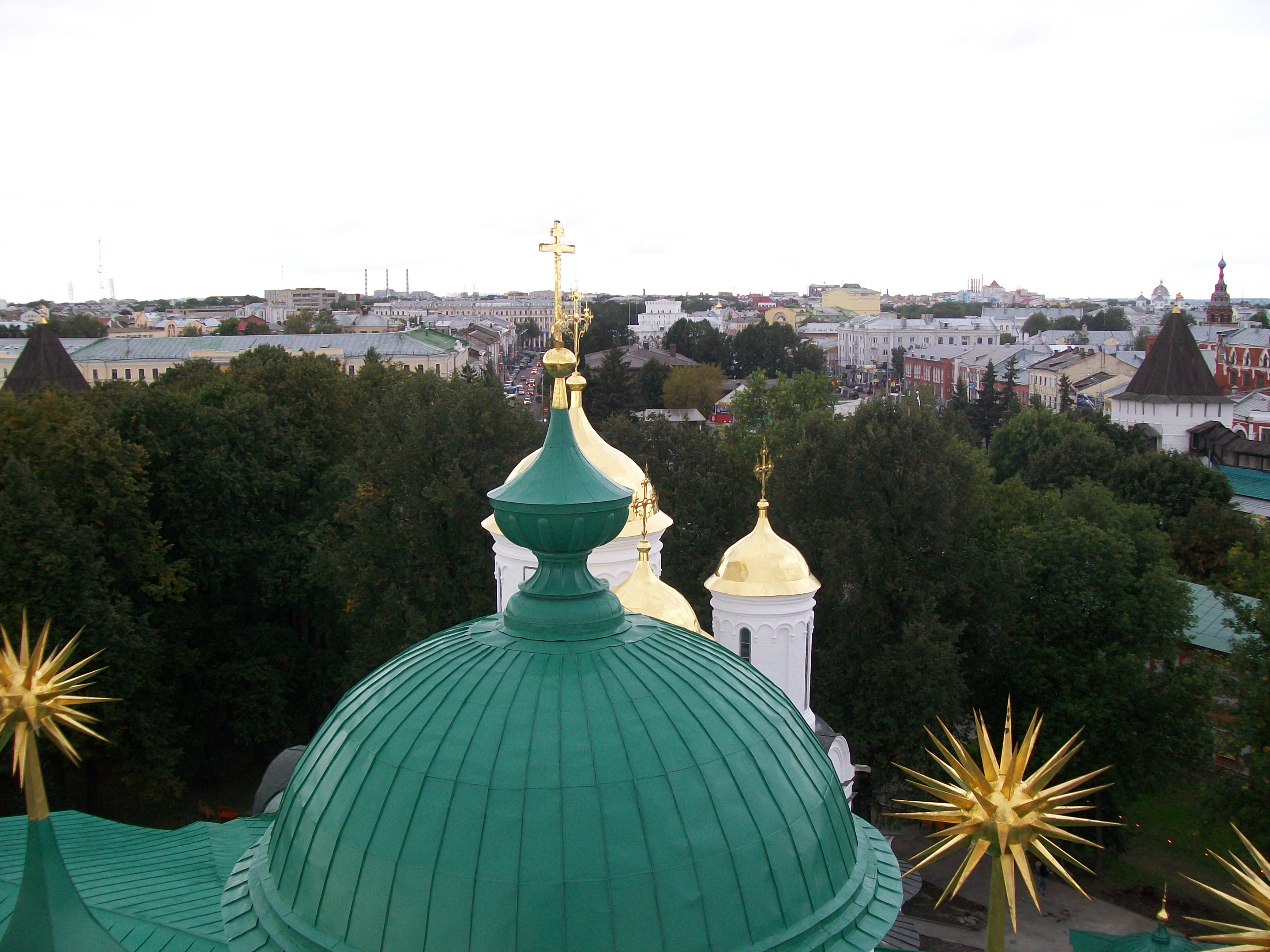 Uitzicht over Jaroslavl vanuit het Kremlin